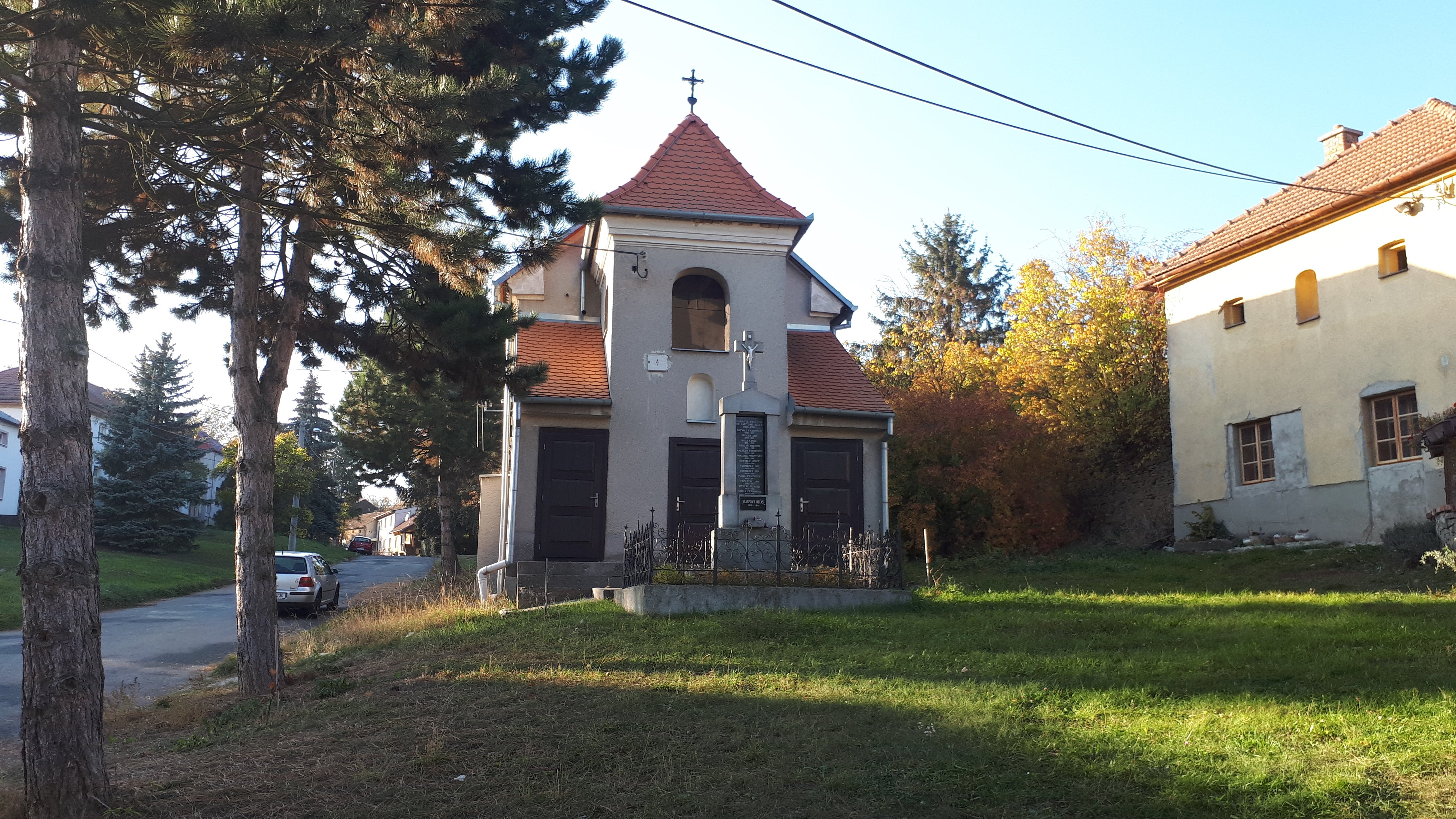 Lhota u Vyškova